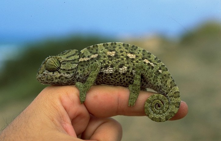 A chamaleo in Morocco